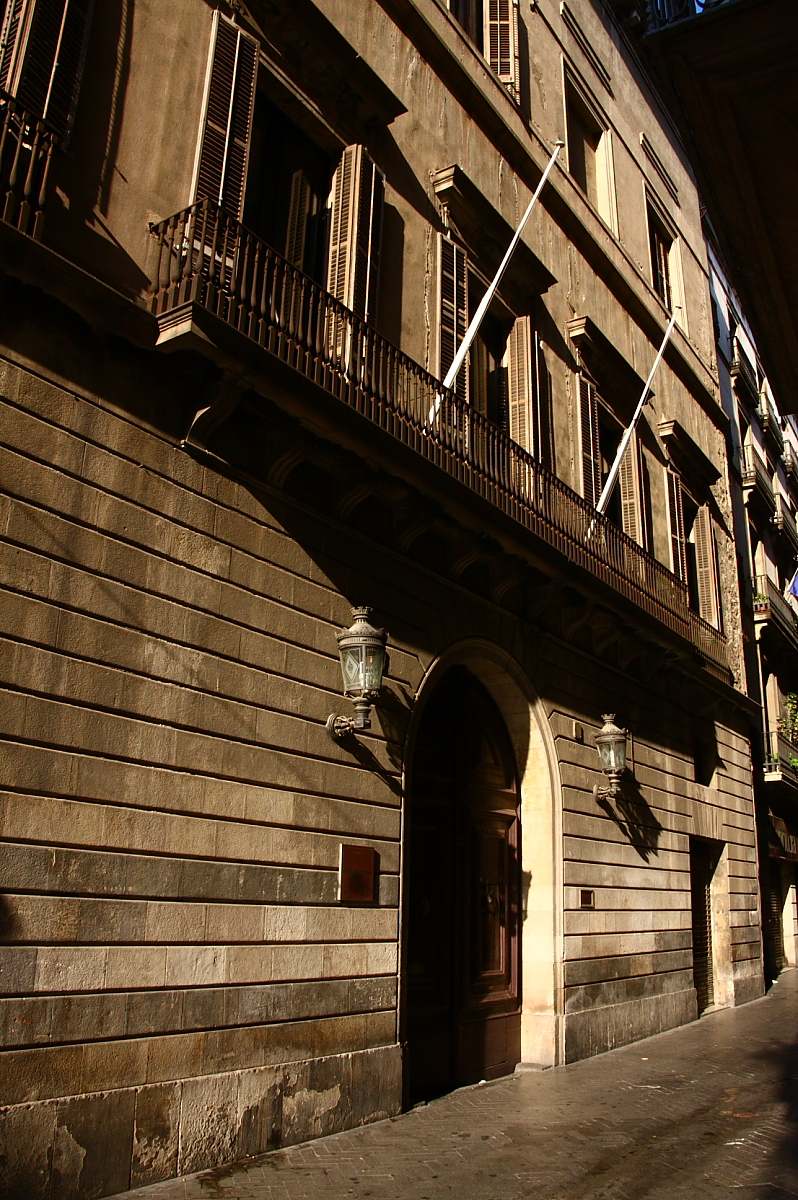 Façana principal de l'Ateneu Barcelonés. C/ Canuda